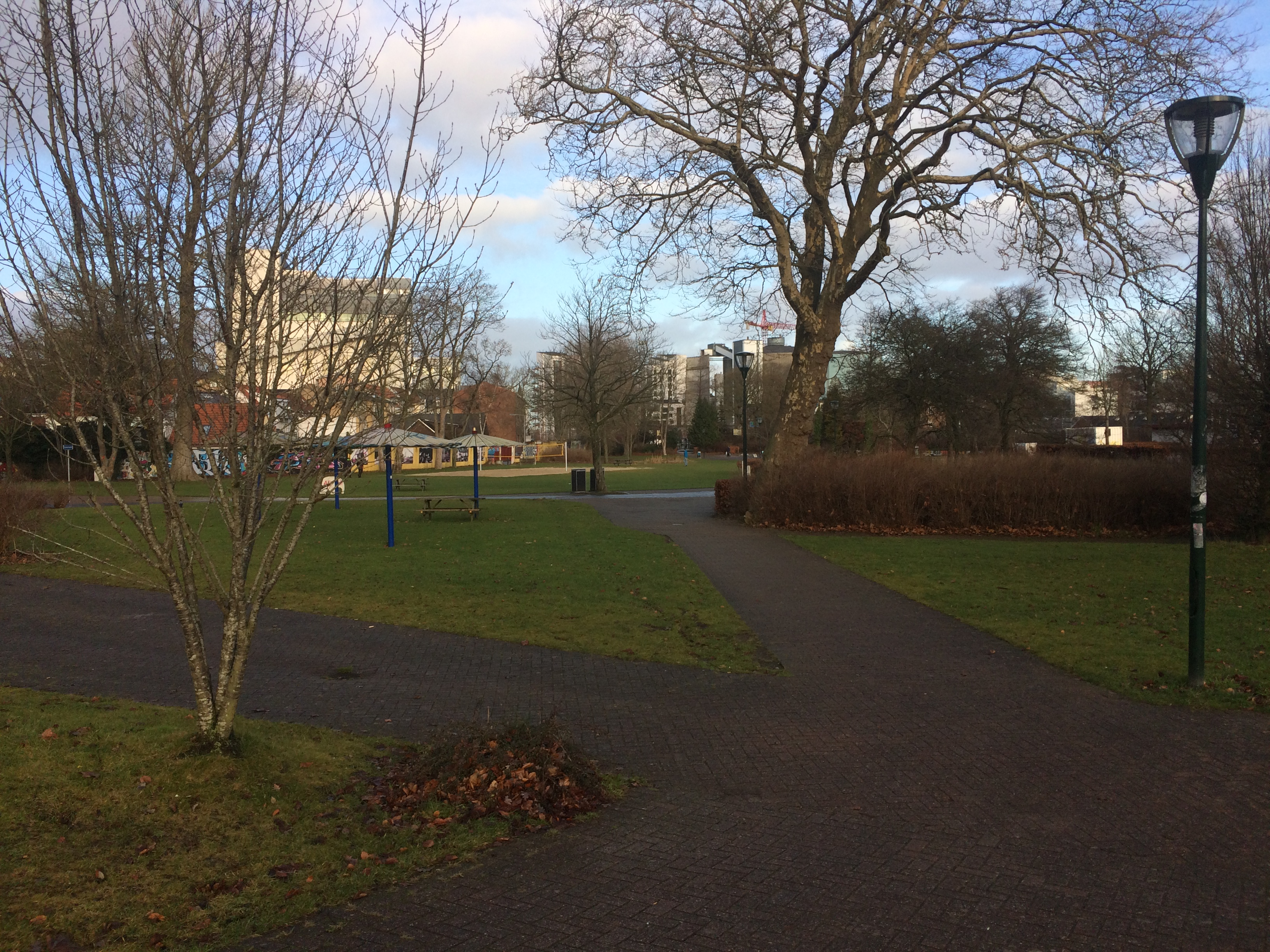 Vue over byparken Karolinelund den 23. december 2016